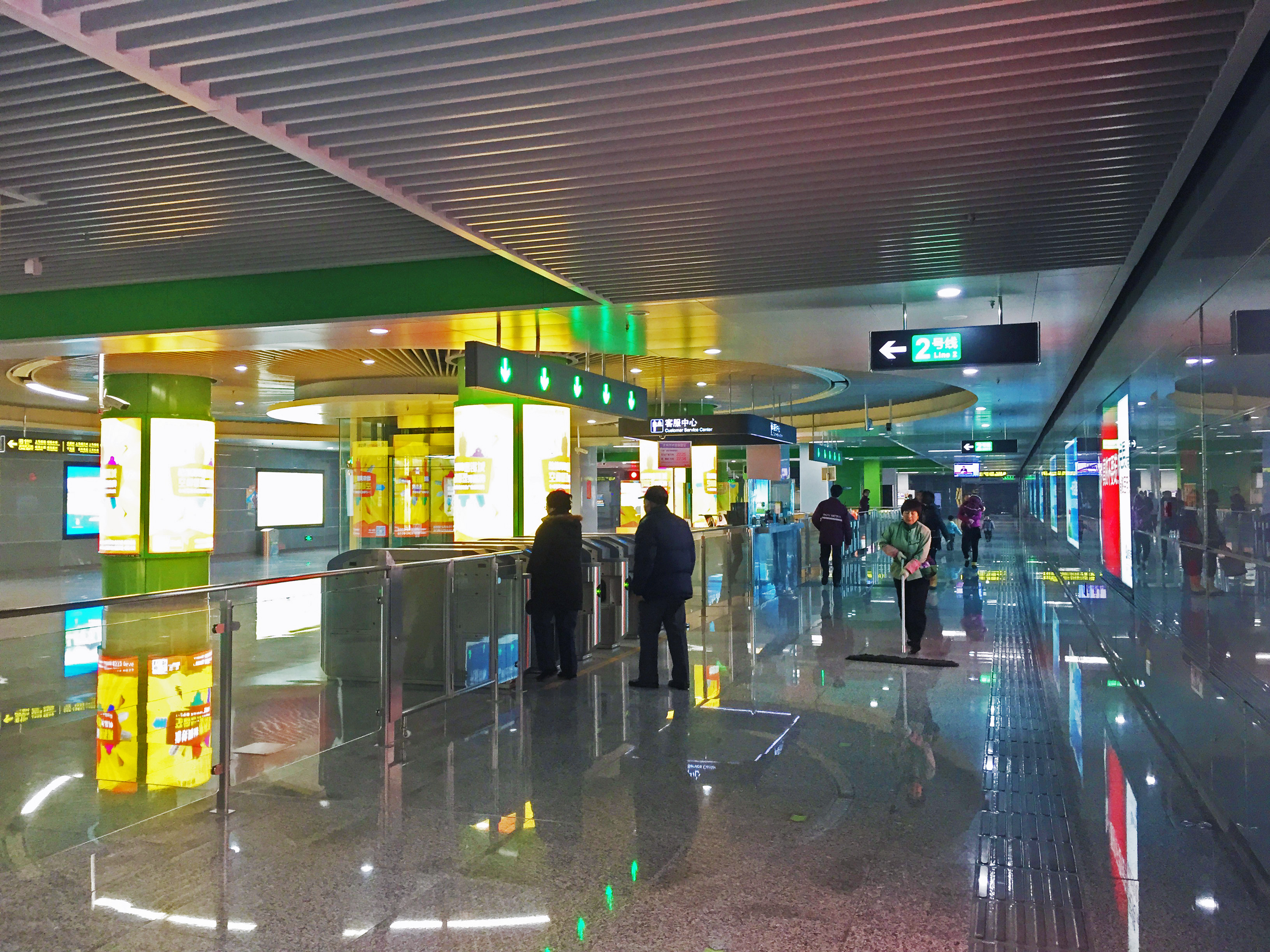 無錫地鐵靖海站站廳